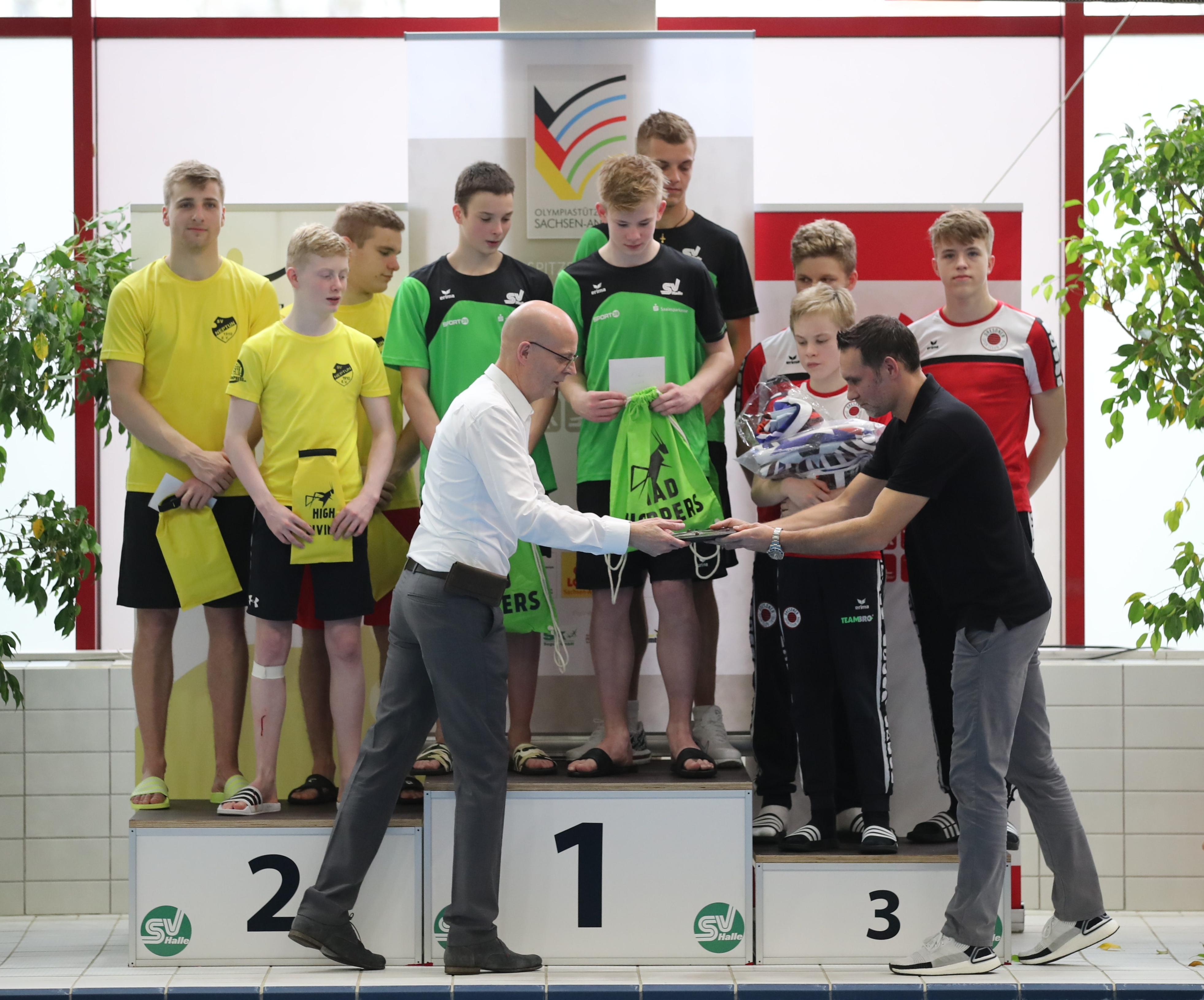 Siegerehrung der Männer vom 47. Hallorenpokal im Wasserspringen in Halle (Saale) am 26. Januar 2020. Abgebildet: Andreas Wels. Bernd Wiegand. Alexander Lube. Finn Paul Neubert. Jaden Eikermann. Jesco Tilmann Helling. Jonathan Schauer. Leon Mahlert. Ludwig Schäl. Moritz Wesemann. Timo Barthel.